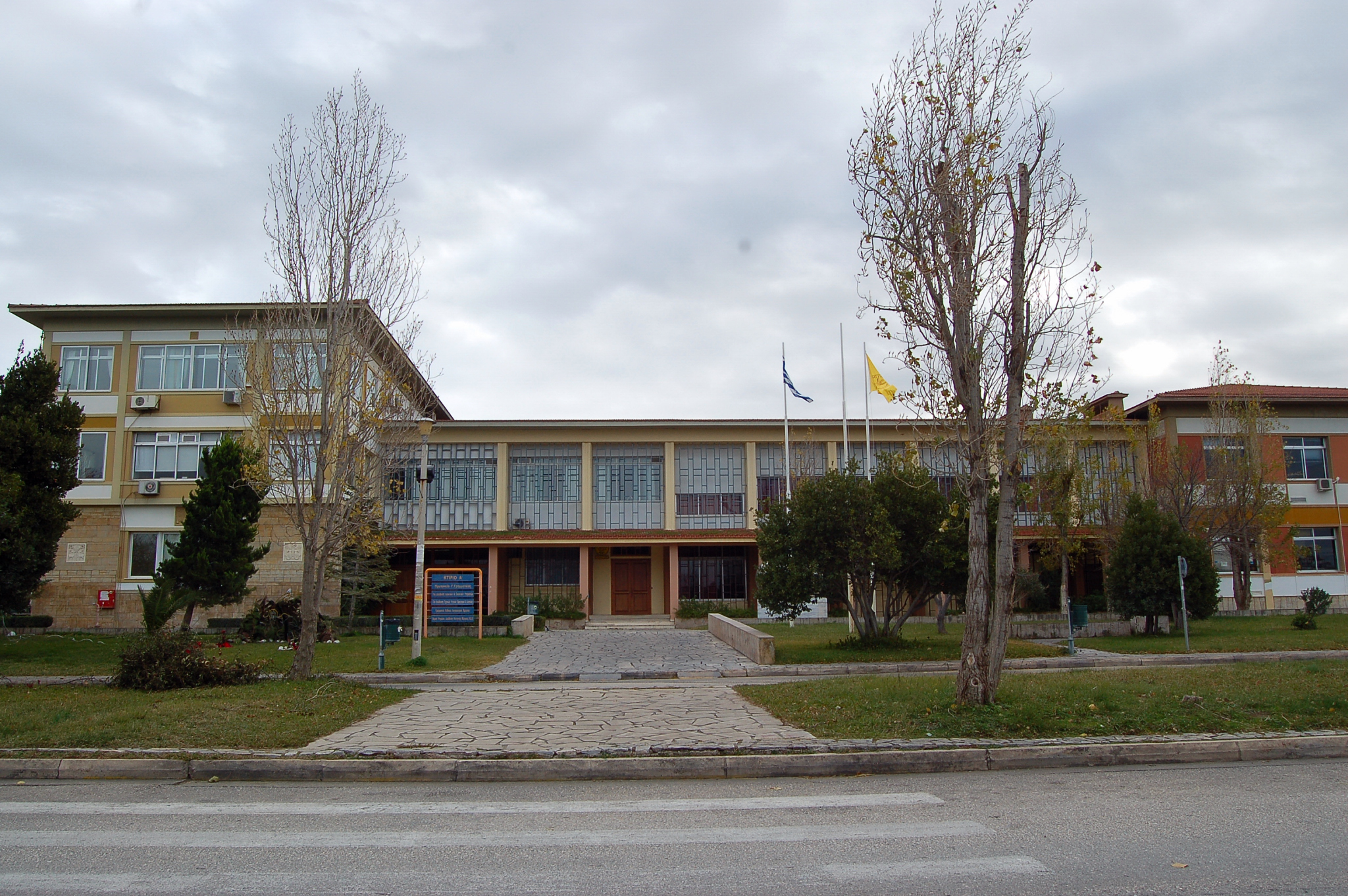 Πανεπιστήμιο Πατρών (Κτήριο Α')